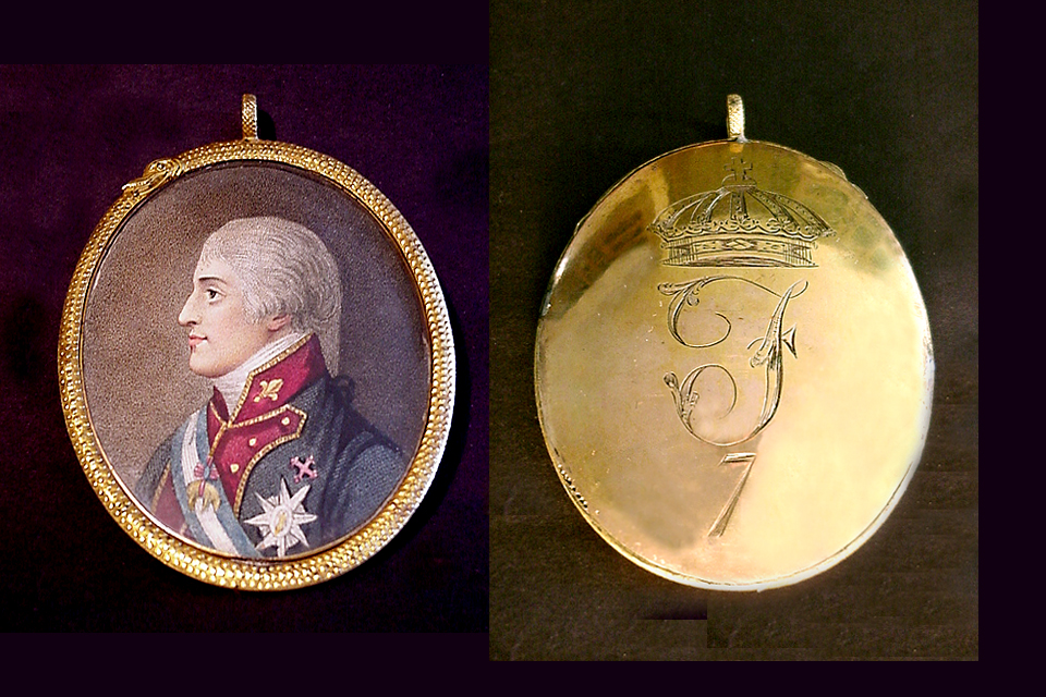 Retrato del rey Fernando VII de España (1784-1833),autor por confirmar,pieza única.